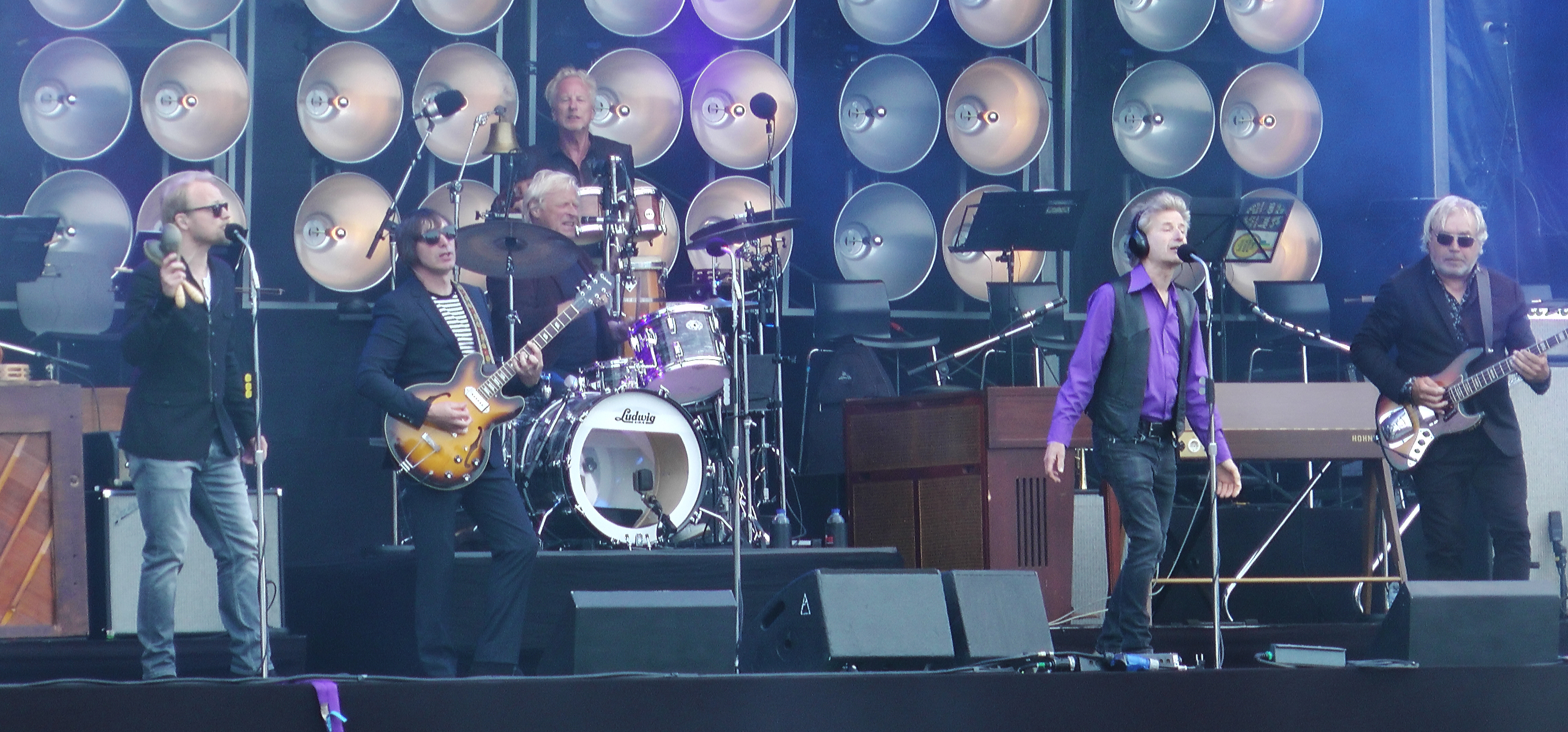 The Analogues, een Beatles-coverband, op het Haagse festival Parkpop in 2018.